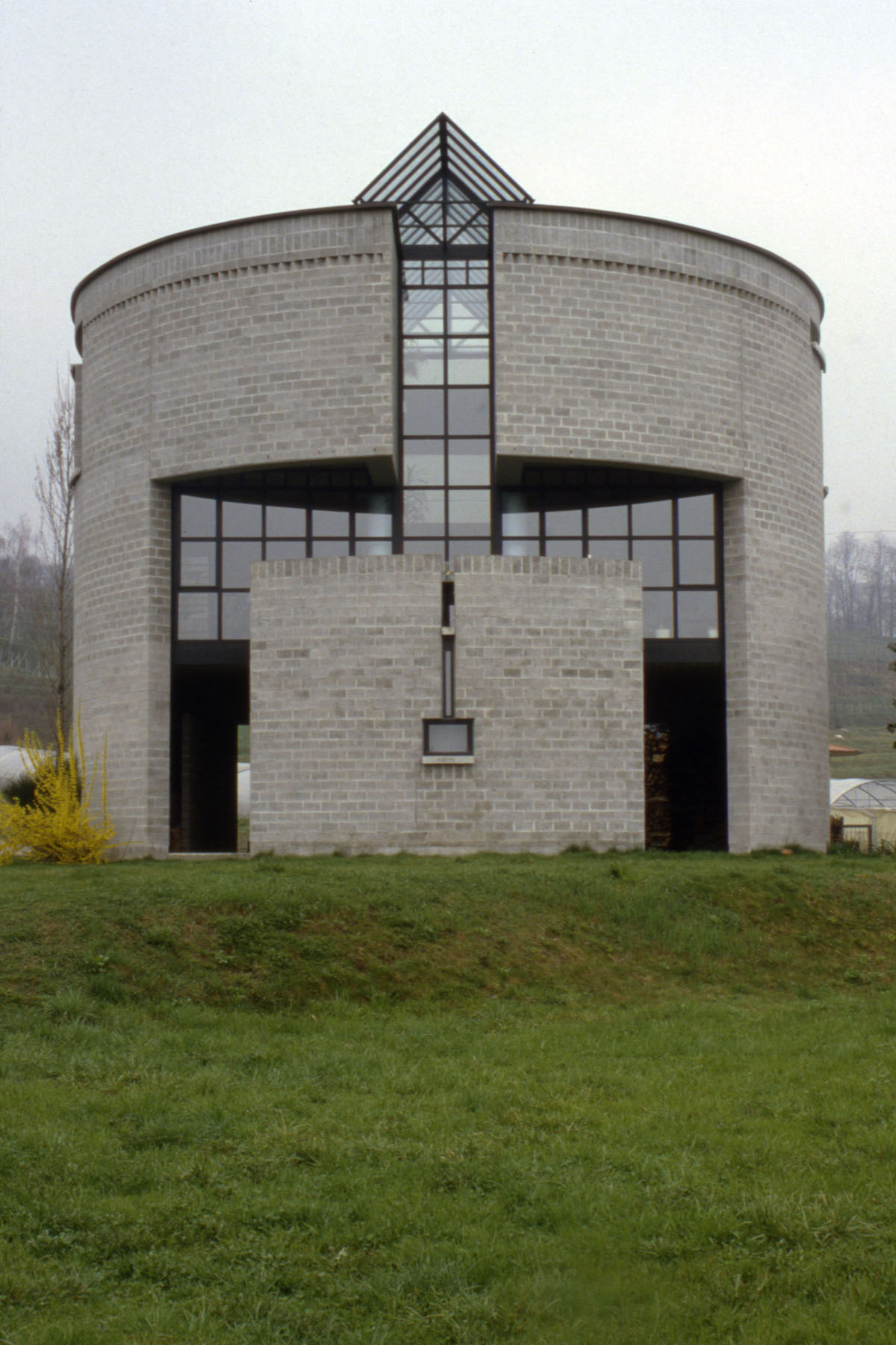 Stabio, Casa Medici (arch. Mario Botta 1980-82)